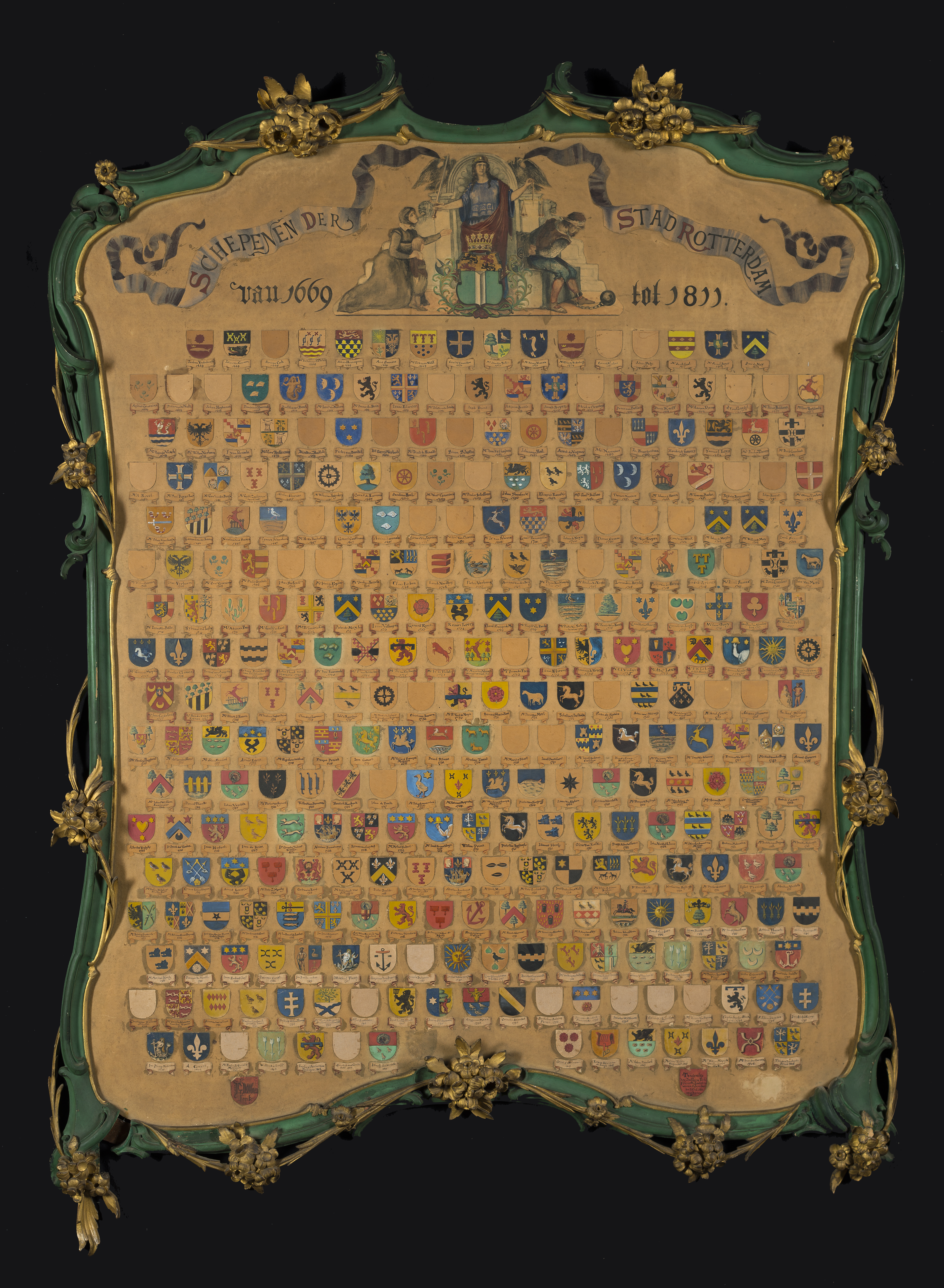 Wapenkaart van de schepenen van Rotterdam, achttiende-eeuwse omlijsting.